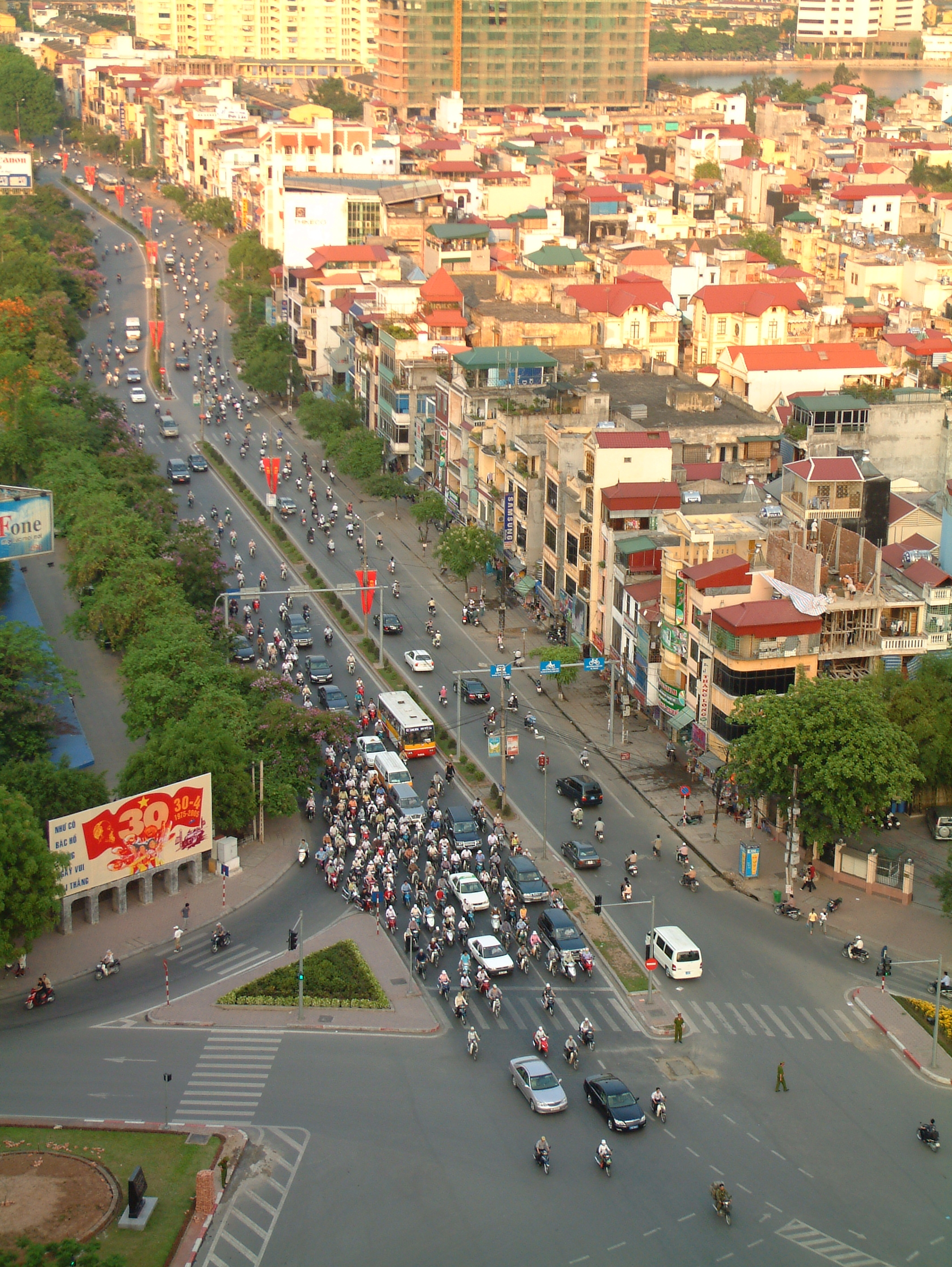 Ханой, вид на город